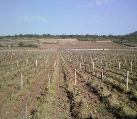 Vue du "Batard-Montrachet" (en bas), du "Montrachet" (au milieu) et du "Chevalier-Montrachet" (en haut)